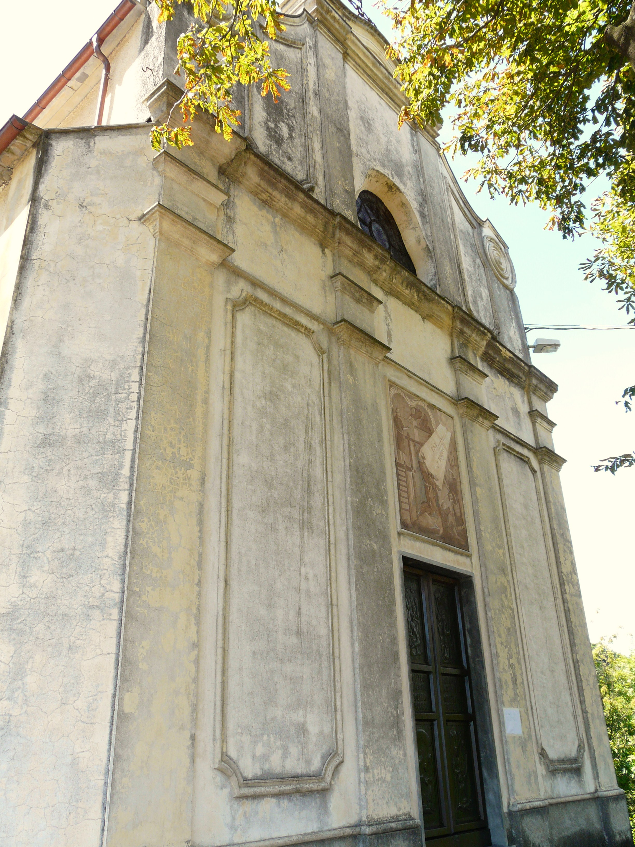 Chiesa di San Francesco, Piandeipreti, Tribogna, Liguria, Italia